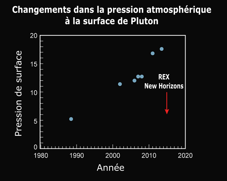 The factual accuracy of this diagram or the file name is disputed.Reason: Premièrement, les unités sur l'axe vertical ne sont pas indiqué. Quelles sont-elles ? Deuxièmement, s'il s'agit des μbars habituels, les données de New Horizons ne sont pas les mêmes que celles de Gladstone et al. en 2016, où 10 μbar est indiqué. De même, l'origine des données précédent New Horizons n'est pas donnée.For usage see: disputed diagram|why L'atmosphère de Pluton est peut-être en train de changer sous nos yeux. Les mesures du vaisseau spatial New Horizons ont révélé que l'atmosphère de Pluton avait une pression de surface relativement basse par rapport aux observations précédentes. Une explication de cette basse pression est que la moitié de l'atmosphère de Pluton aurait récemment gelé sur la surface de la planète. Si cela est confirmé, cela indiquerait que de nouvelles baisses de pression peuvent être envisagées.